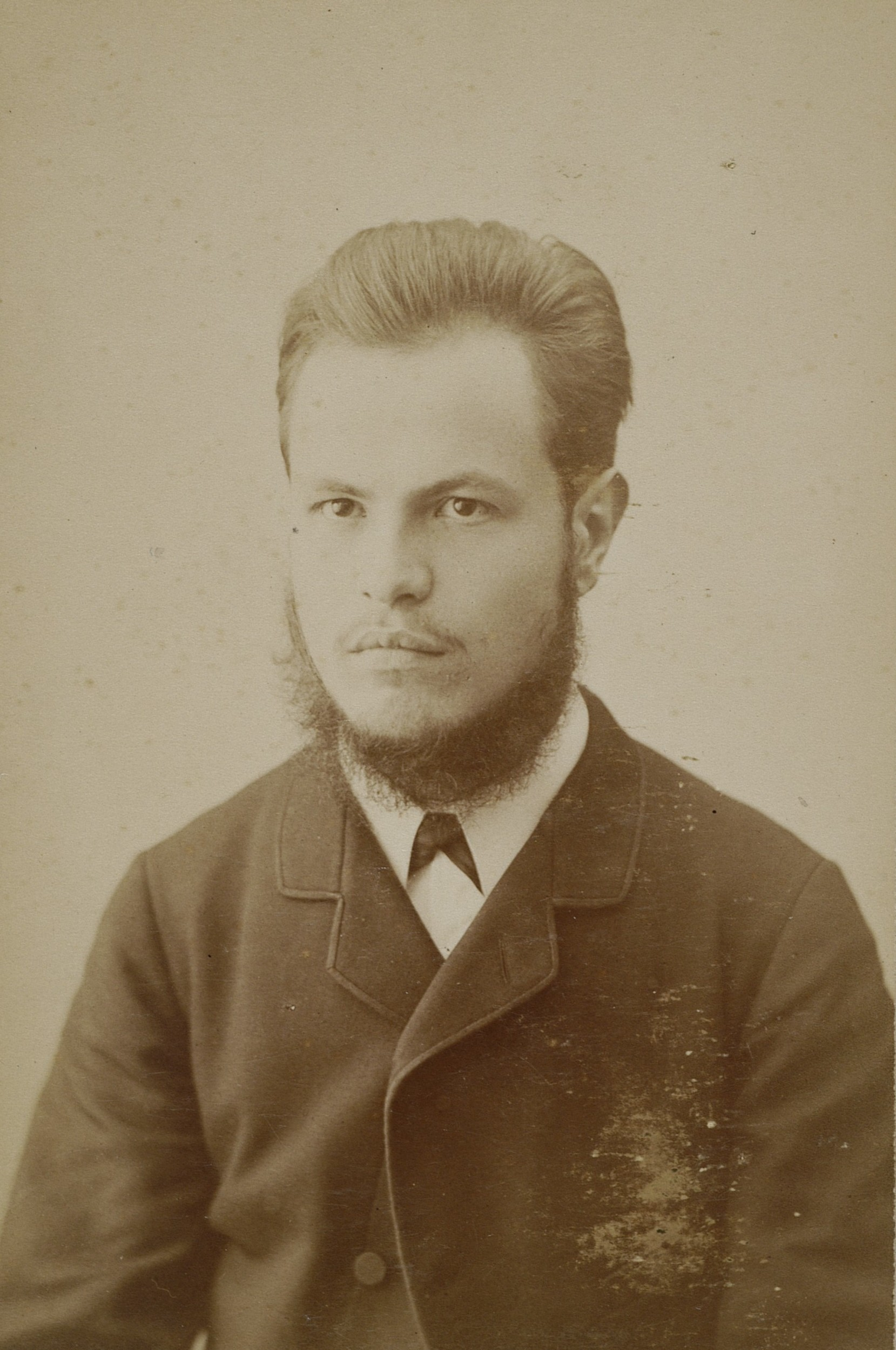 Portret Wincentego Lutosławskiego, ok. 1885 r.